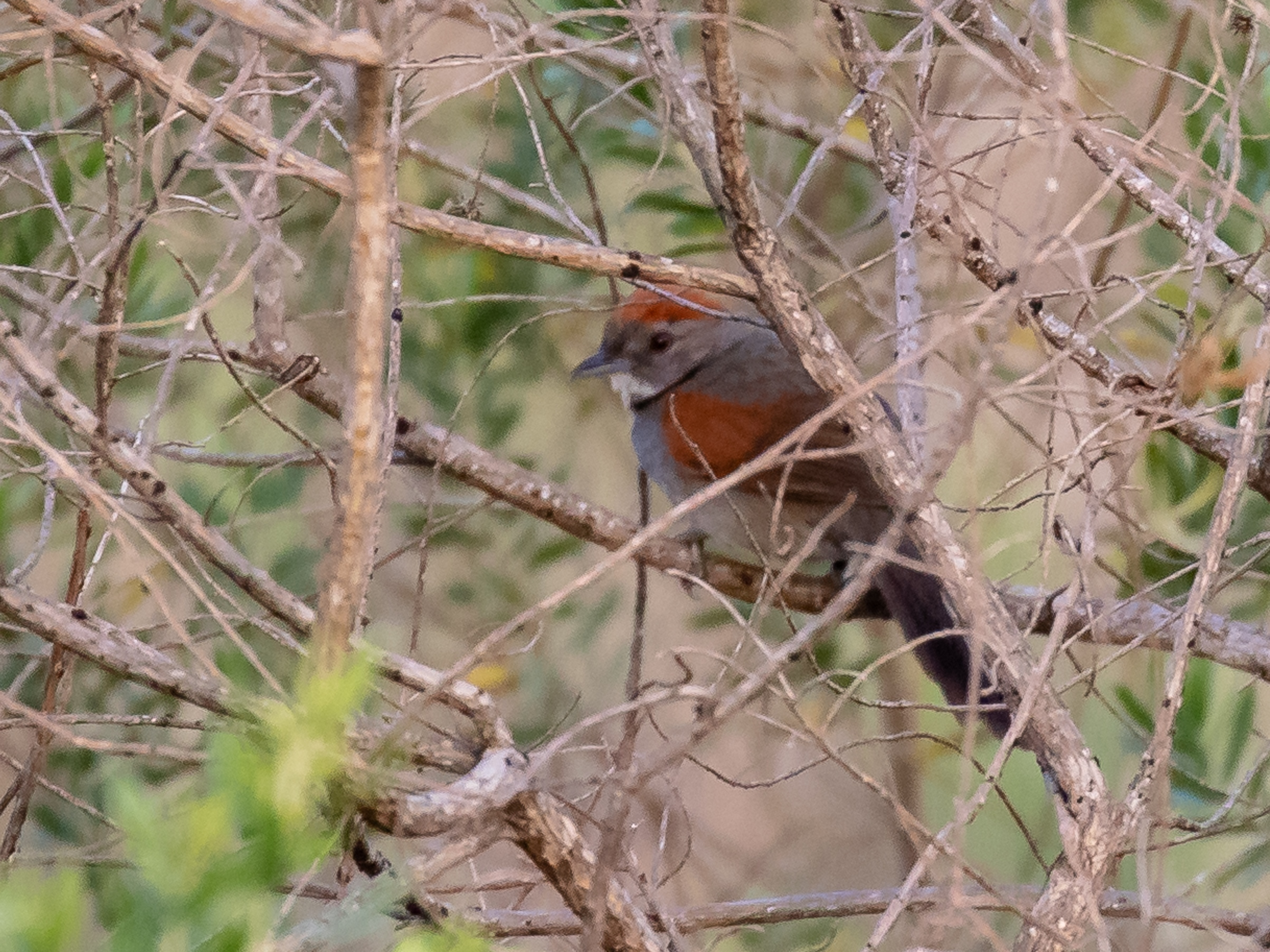 João-grilo; Uberaba, Minas Gerais, Brasil አማርኛ: Cinereous-breasted Spinetail; Uberaba, Minas Gerais, Brazil